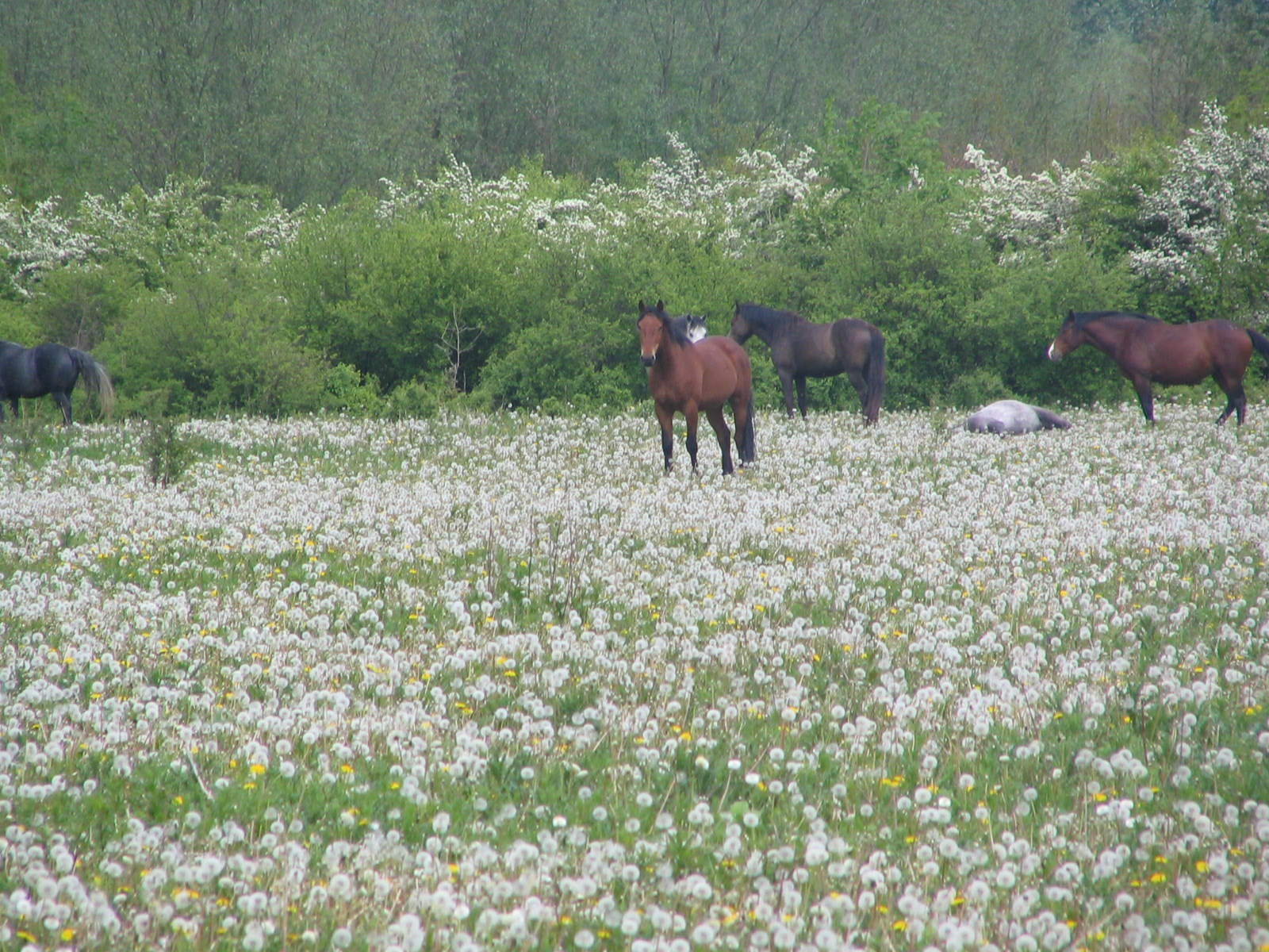 Eigen foto. GerardM 10 mei 2004 12:15 (CEST)